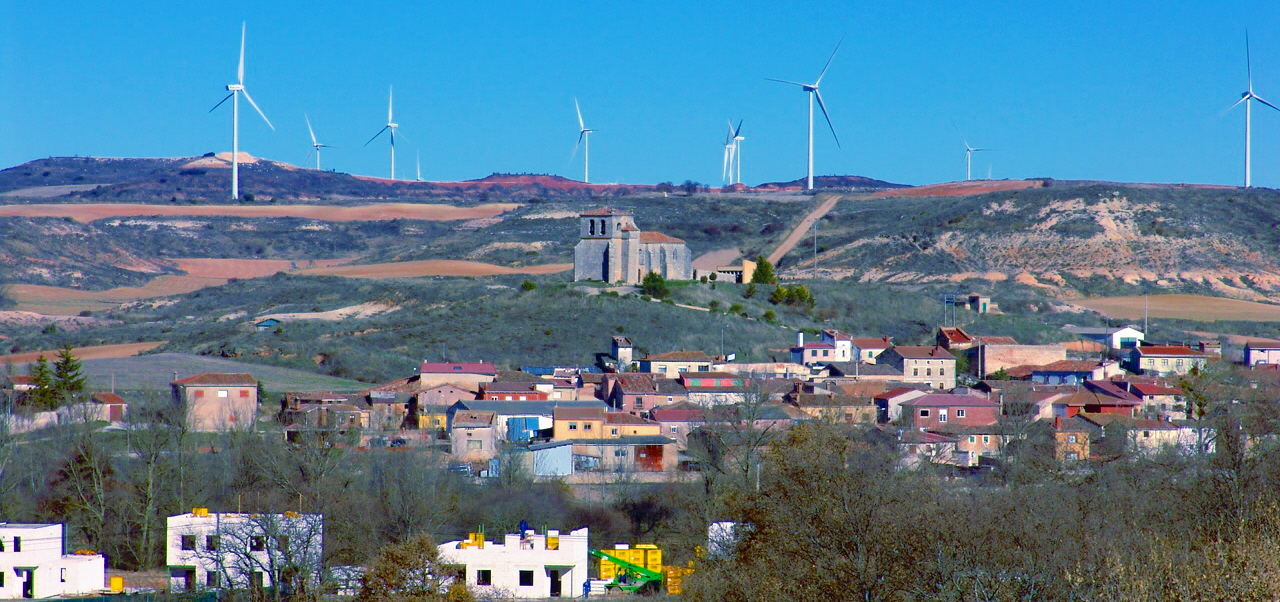 Vista de Revillarruz, Alfoz de Burgos, España